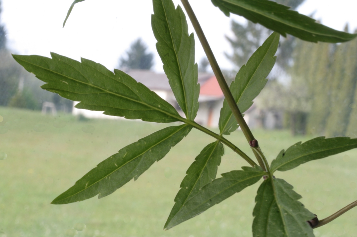 Cardamine_bulbifera (Dentaria Minore) Località : Melere, Trichiana (BL), 843 m s.l.m.